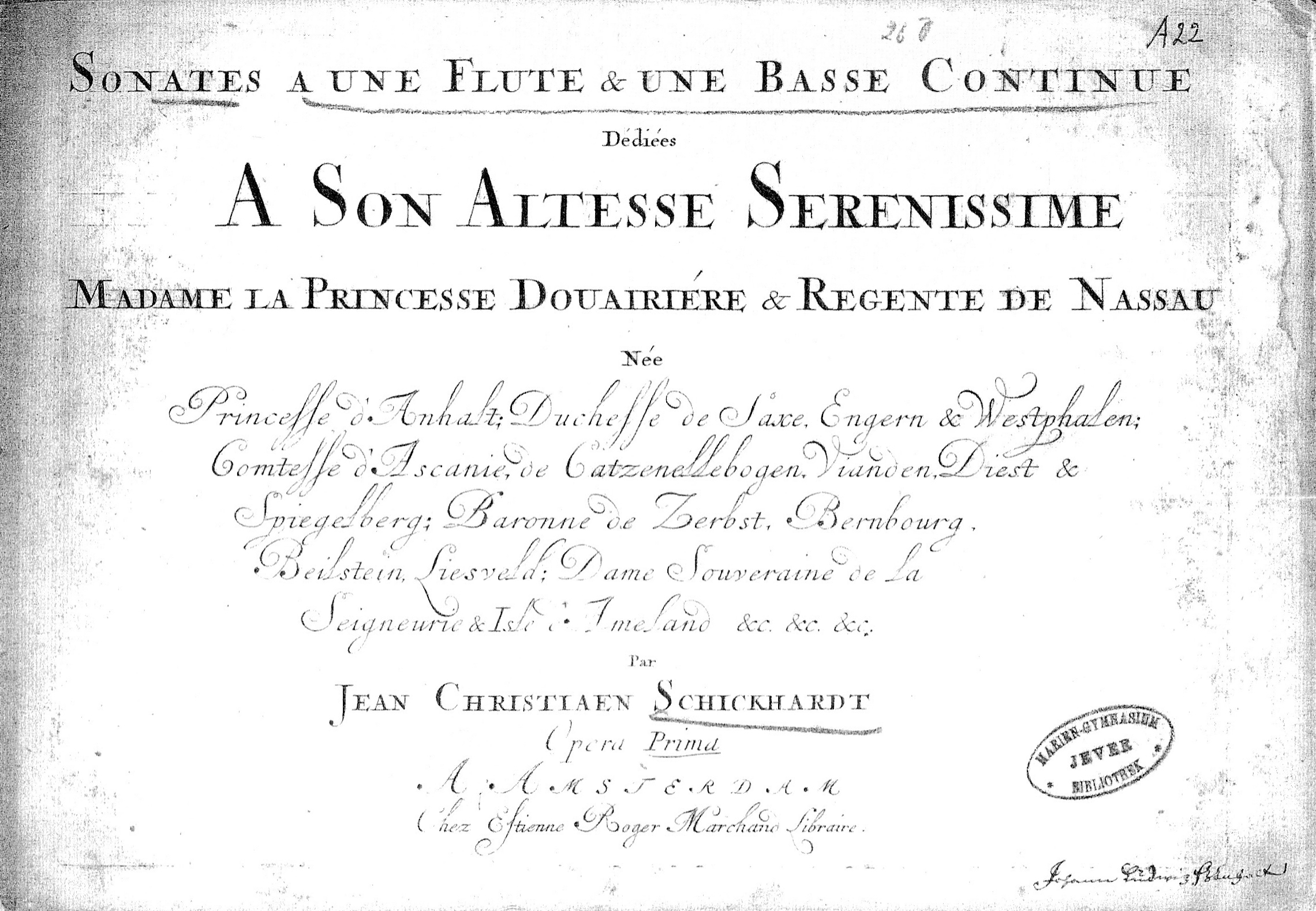 Titelseite zu Sonate für Flöte und Basso continuo op. 1 von Johann Christian Schickhardt